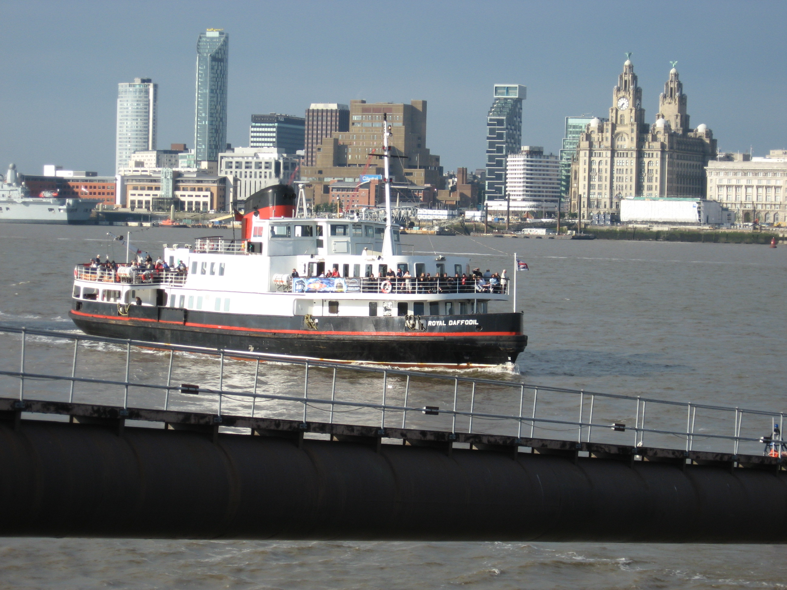 Veerboot in Liverpool